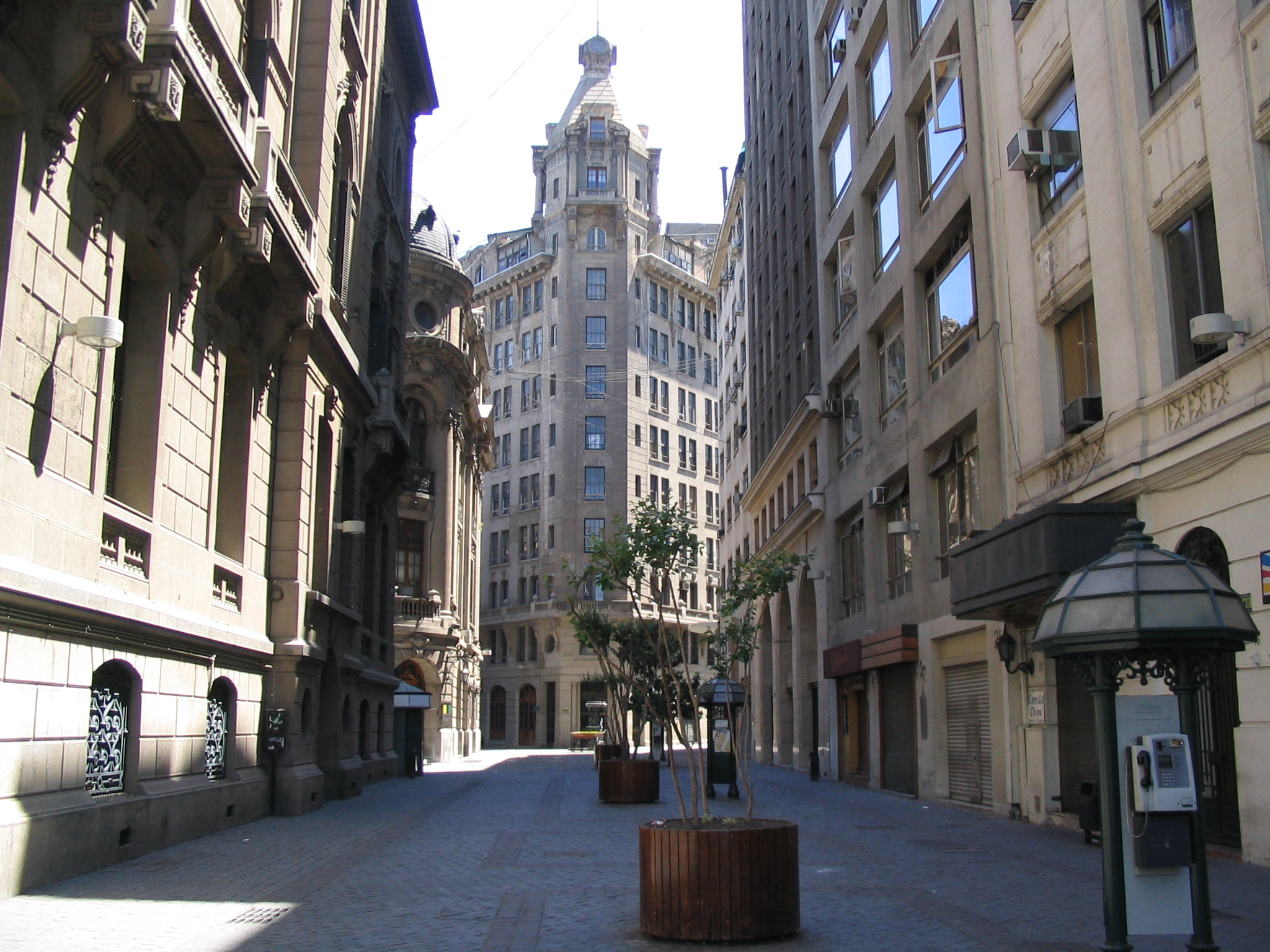 Calle Nueva York, Santiago de Chile.